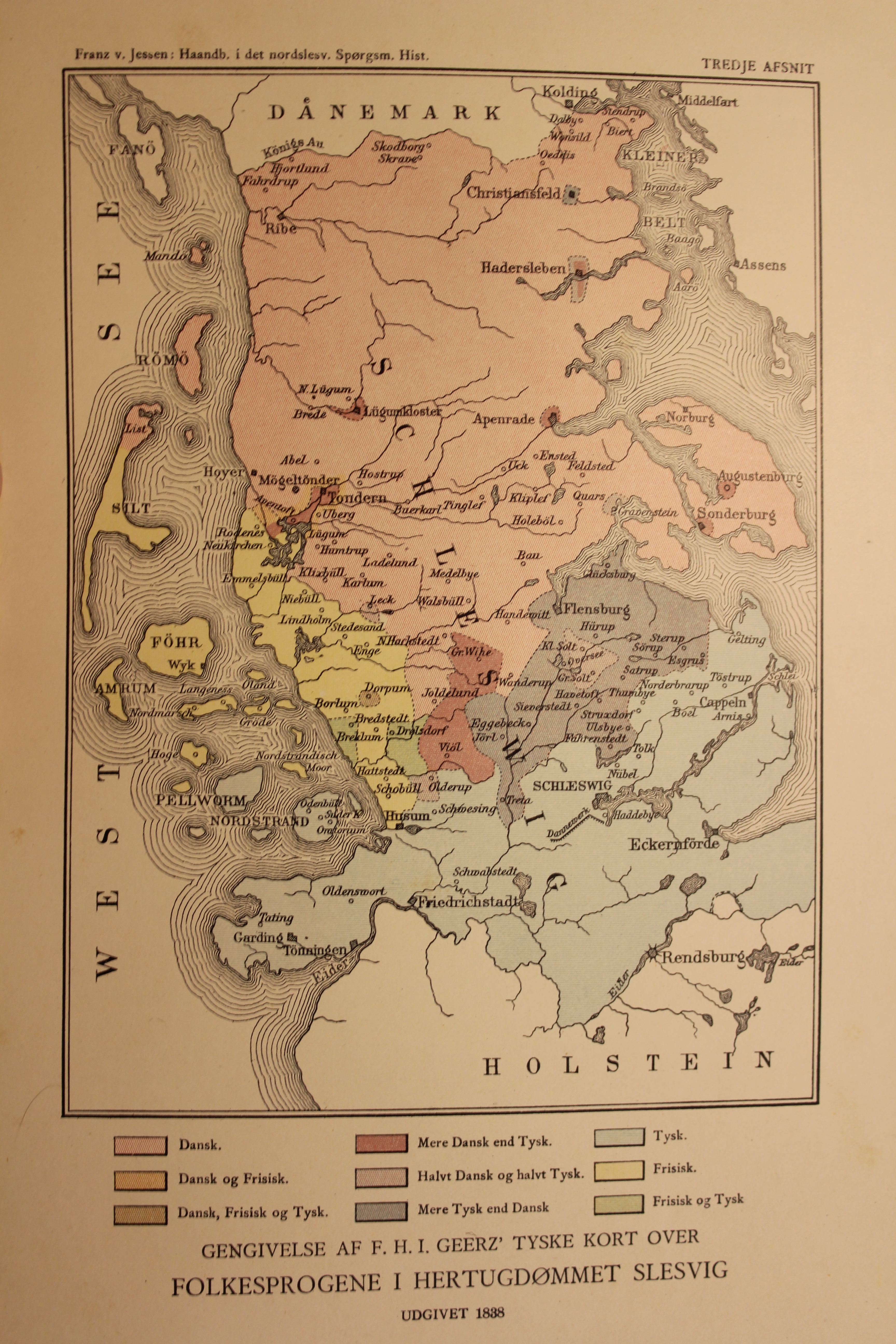 Kortet fra 1838, lavet af den prøjsiske major og kartograf F.H.I. Geerz, i Haandbog i det nordslesvigske Spørgsmaals Historie, 1901; Higher Resolution Version fra Folkesprogene i Hertugdømmet Slesvig - Map Only Version: her